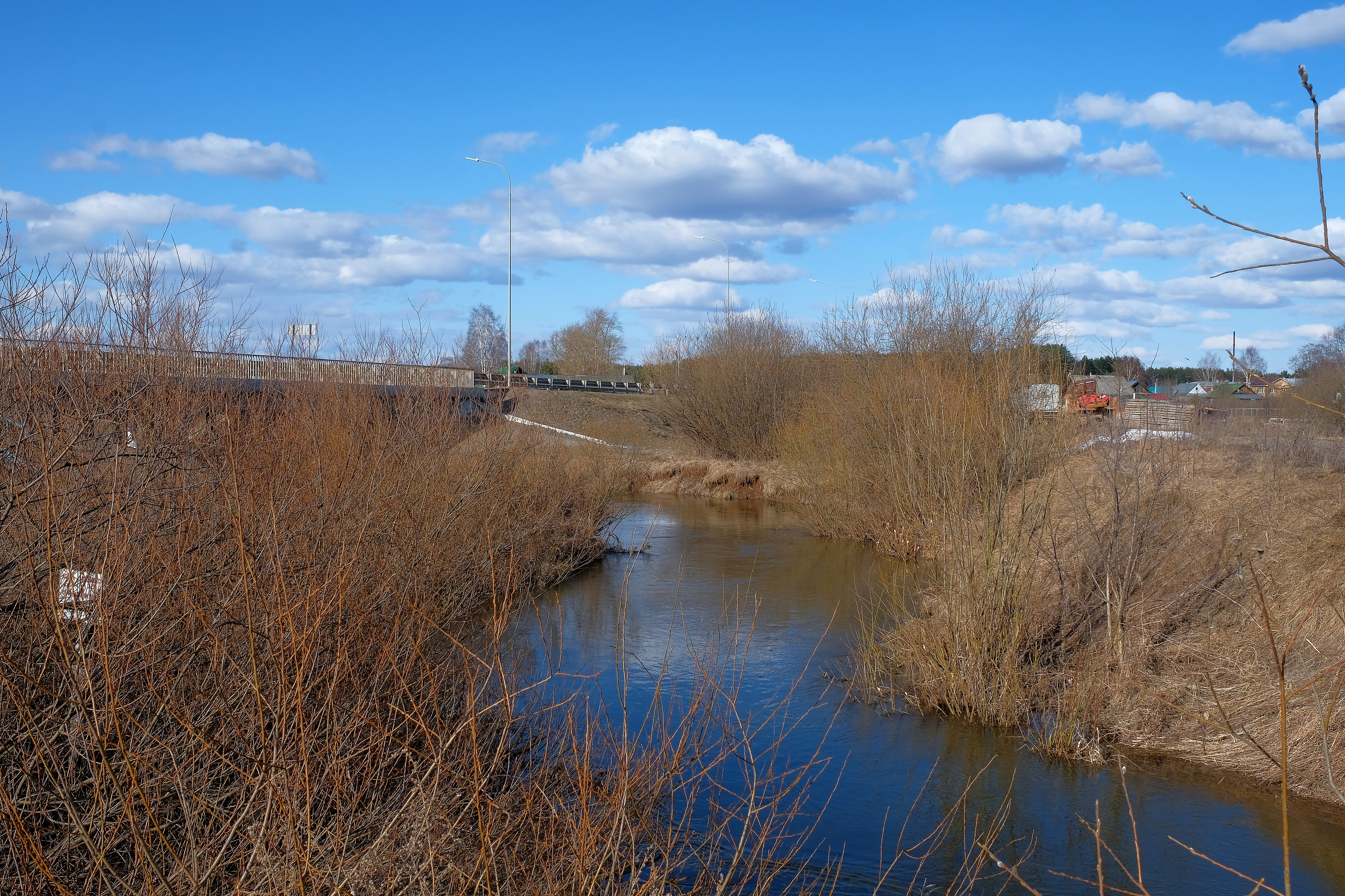 Устье Селычки (впадает в Иж) около посёлка Селычка в Удмуртии